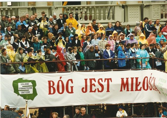 W Licheniu w spotkaniu z papieżem udział wzięło kilka tysięcy sołtysów